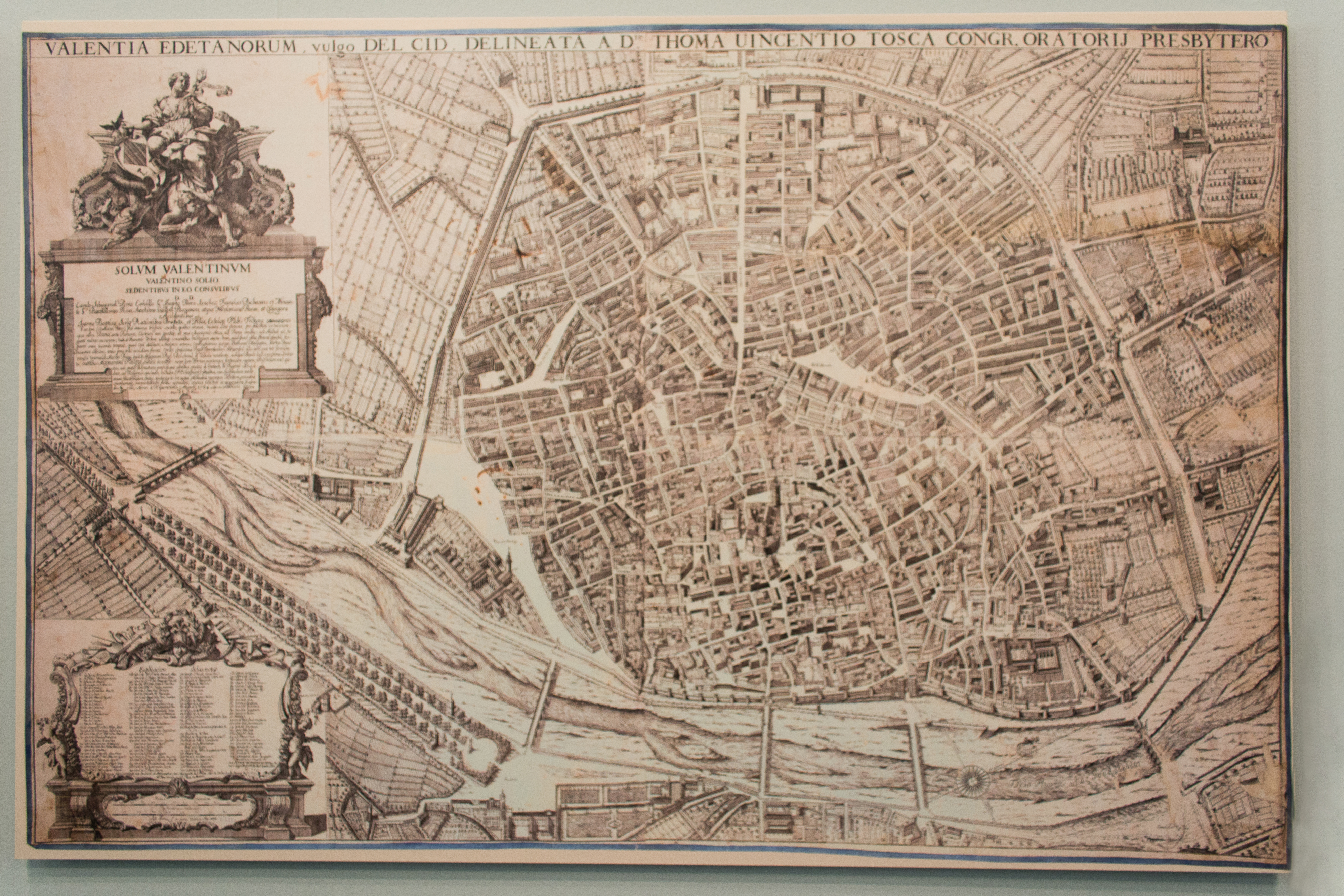 Mapa de Valencia según Tomás Vicente Tosca (c. 1738) en el MuVIM. Leyenda: VALENTIA EDETANORUM, vulgo DEL CID, DELINEATA AD THOMA UICENTIO TOSCA CONGR. ORATORIJ PRESBYTERO.